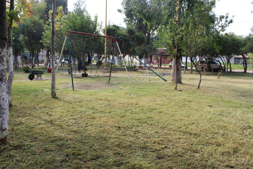 Zona de juegos.